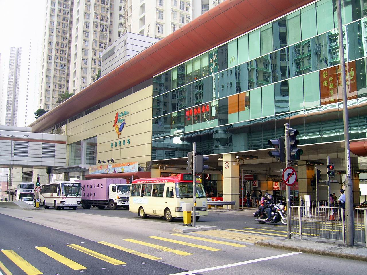 鯉魚門廣場外觀